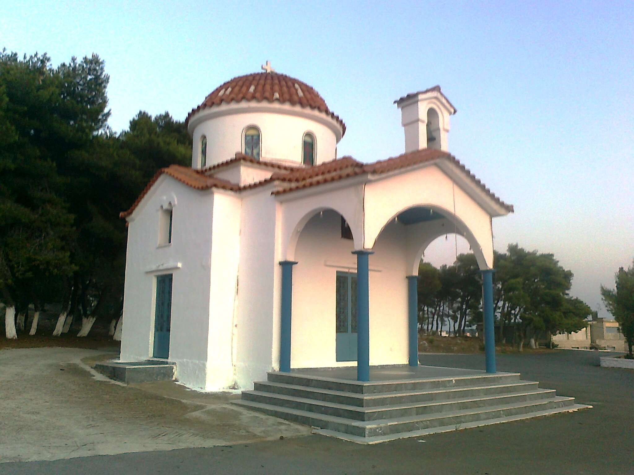 Γαργαλιάνοι Μεσσηνίας. Το εκκλησάκι του Προφήτη Ηλία.